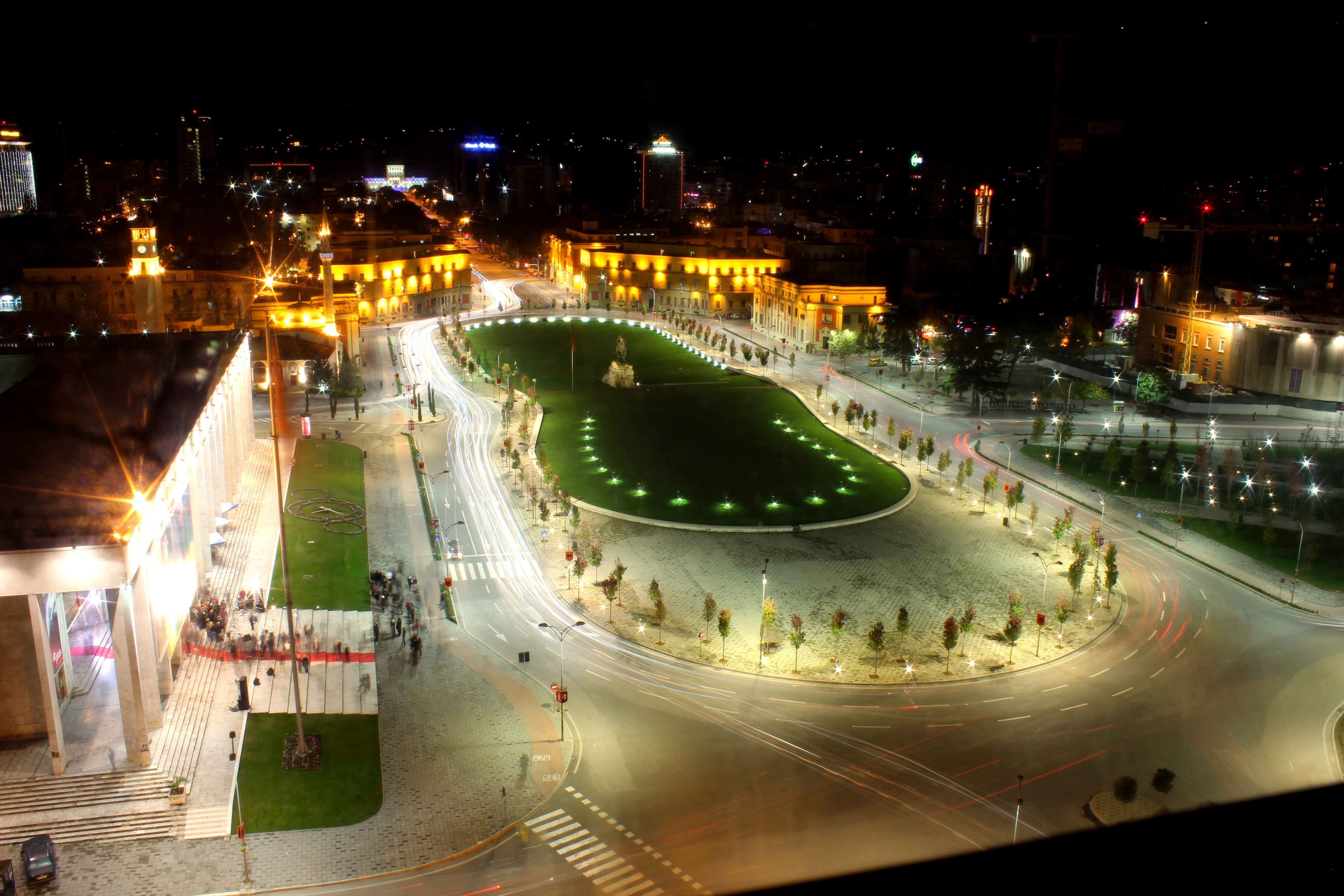 Tirana night view from International Hotel Tirana